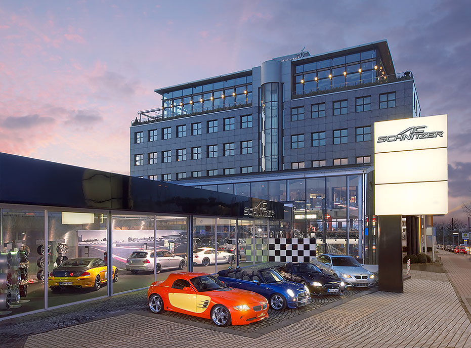 Firmengebäude von AC Schnitzer